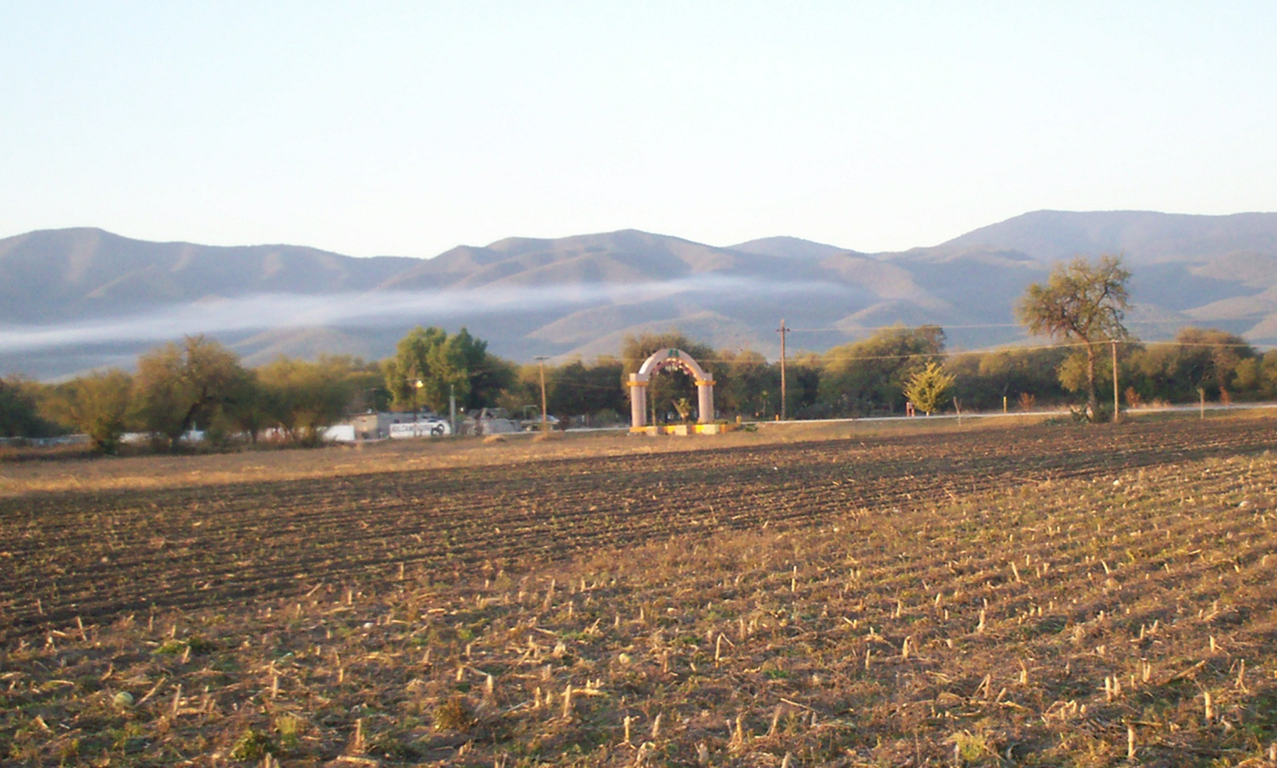 Babytexcoco tomo esta fotografia de el arco a la entrada de Villa Juarez, SLP en diciembre del 2006.